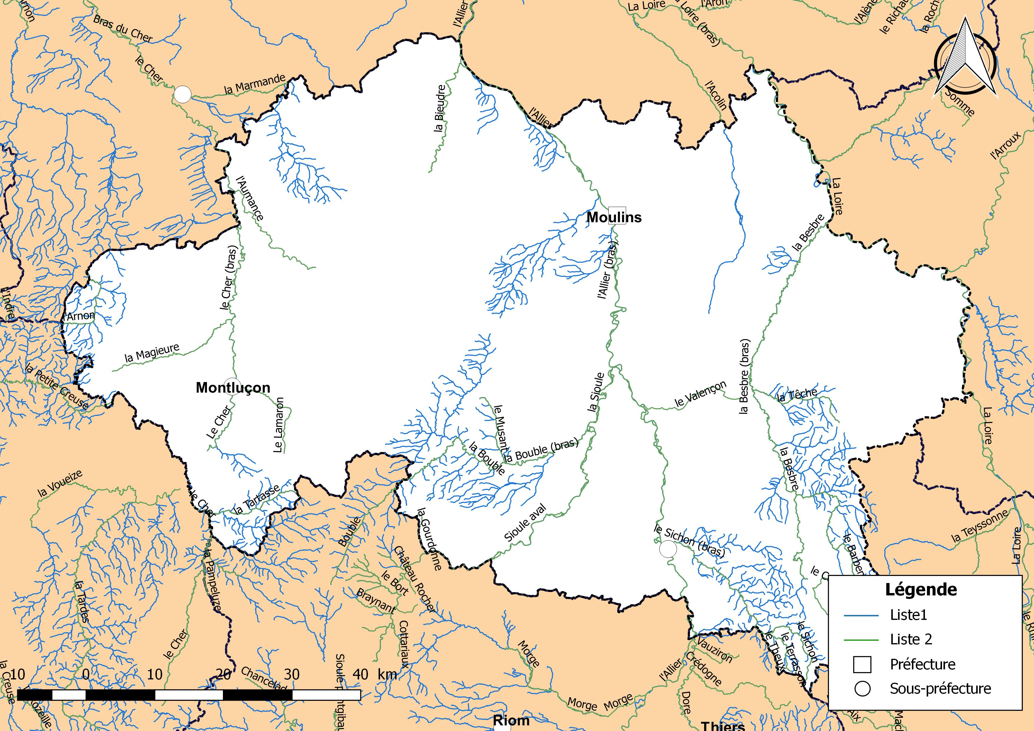 Classement des cours d'eau du département de l'Allier (France) au titre de la continuité écologique (article L214.17 I du Code de l'environnement).